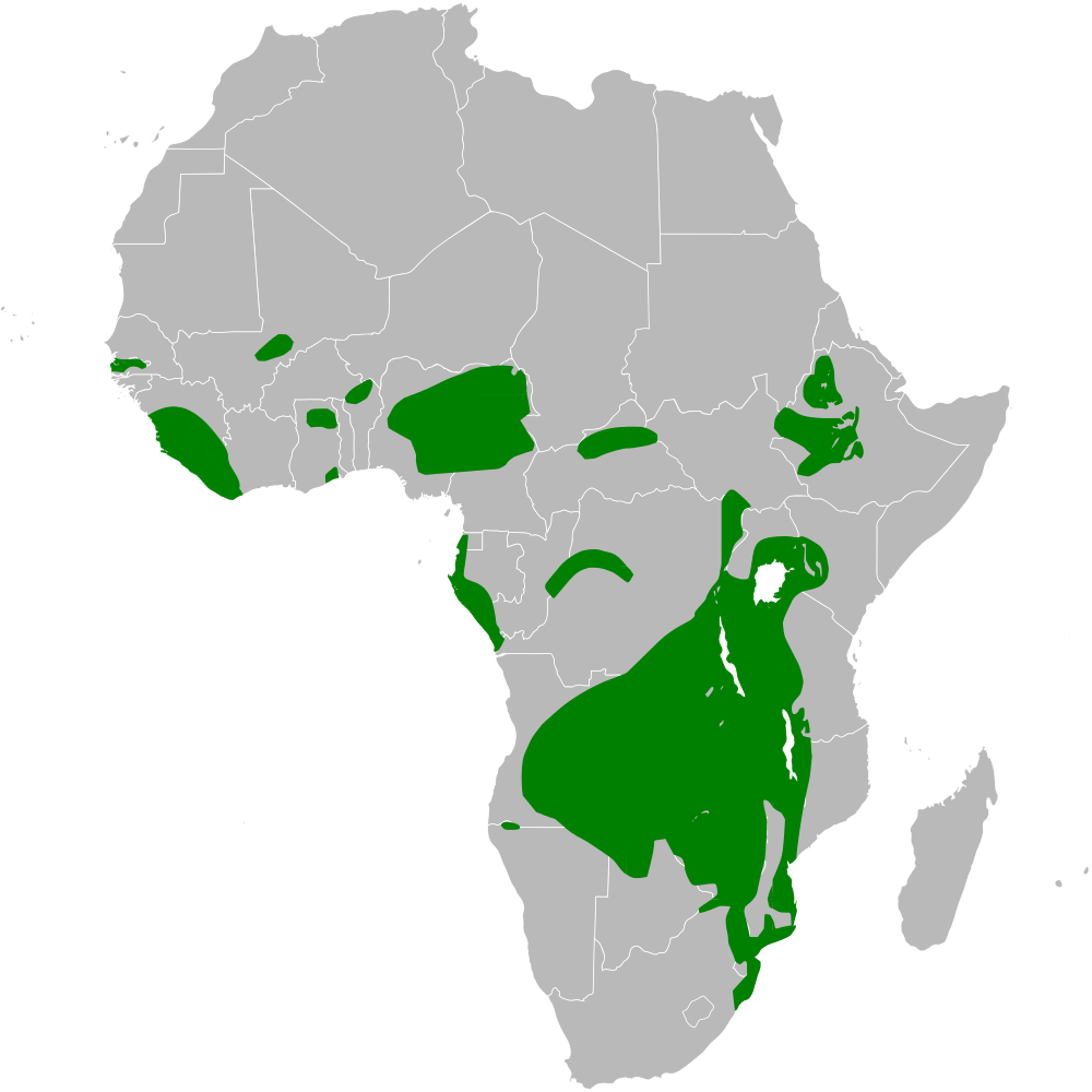 Pseudhirundo griseopyga distribution map, based on